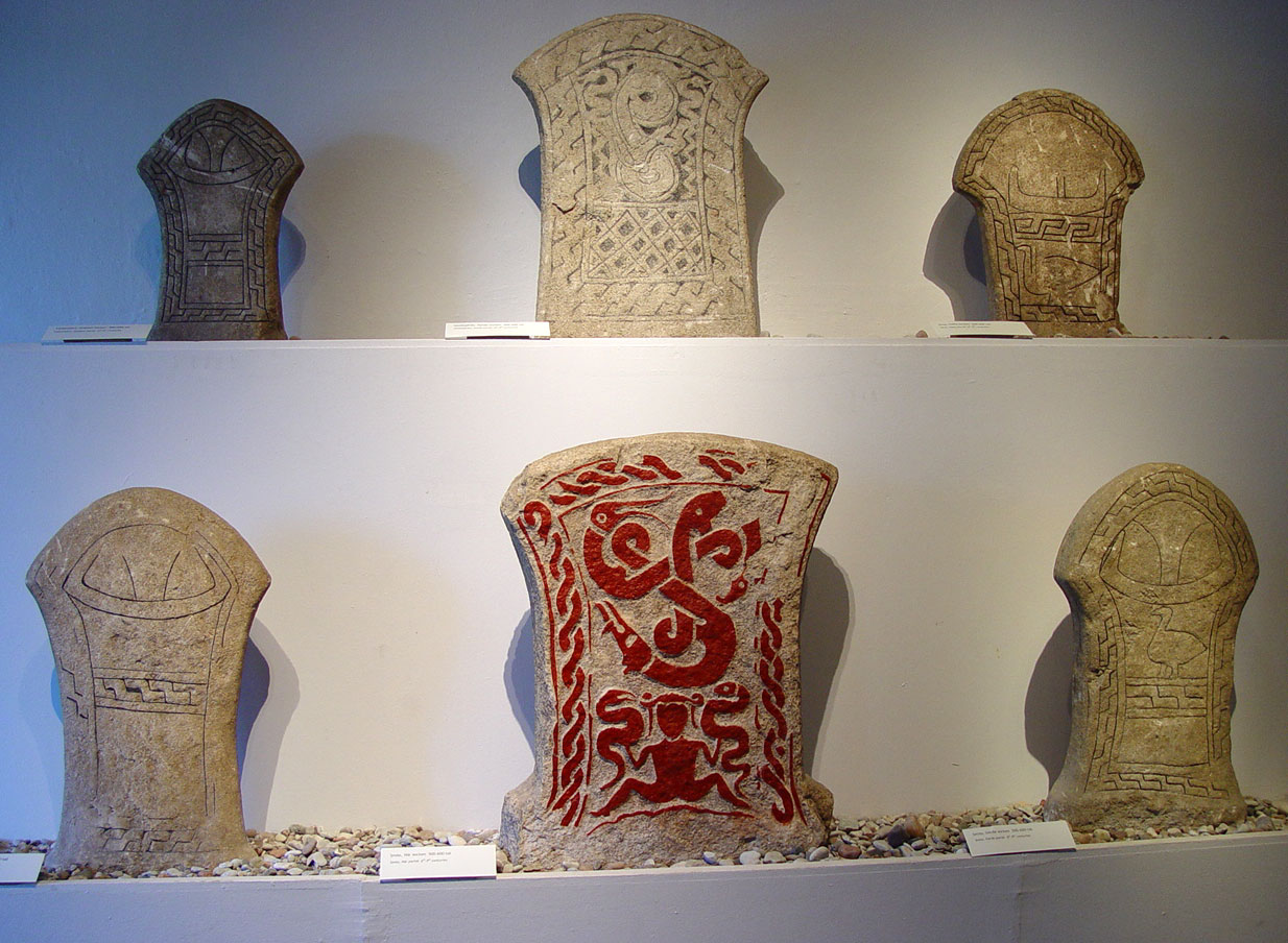 Bildstein im Museum Fornsalen, Visby (Gotland).